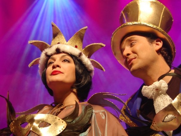 סינליה מתוך "עלילות פרדיננד פדהצור" בבימוי ישראל גוריון בתיאטרון המדיטק.